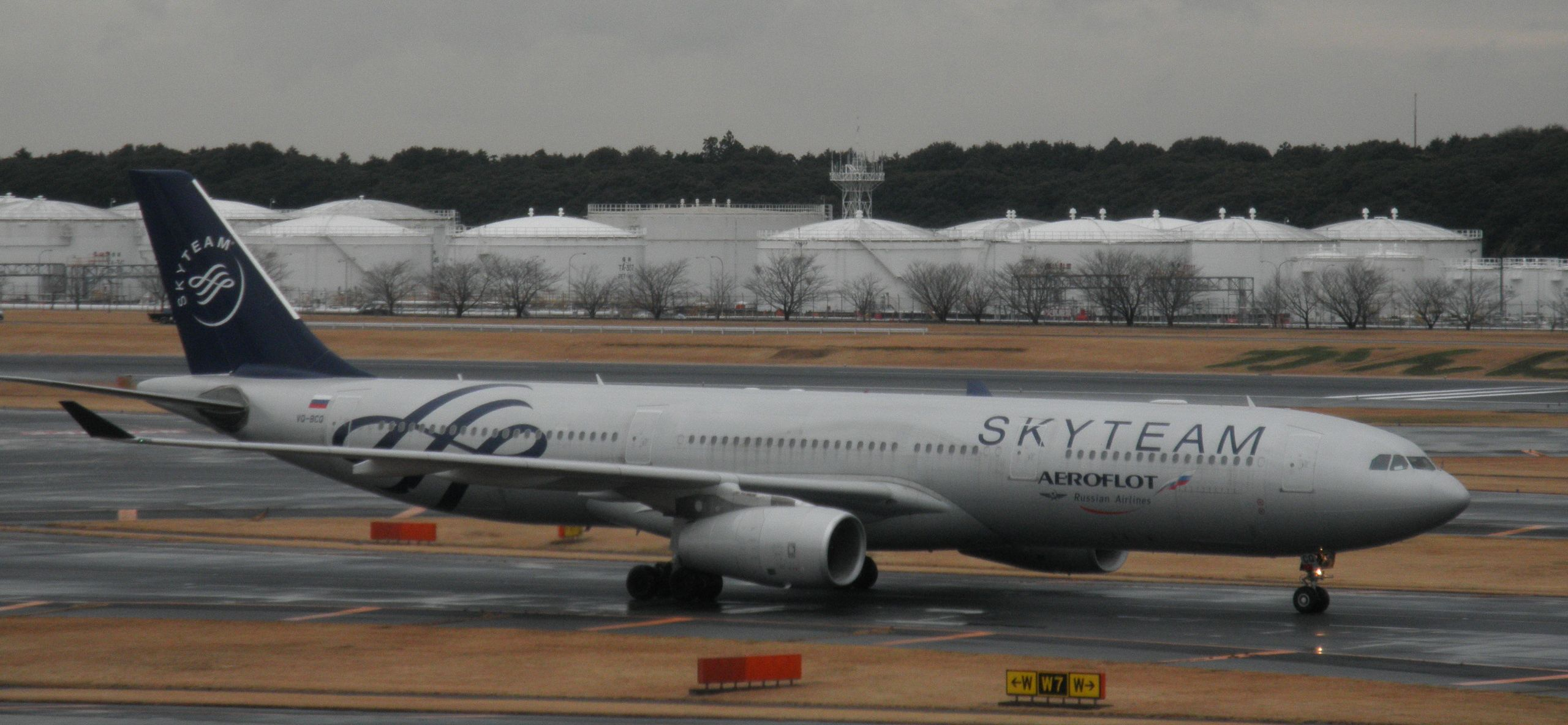 エアバスA330-300 SKYTEAM塗装機